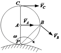 Миттєвий центр швидкостей при коченні: Миттєвий центр швидкостей при коченні без проковзування